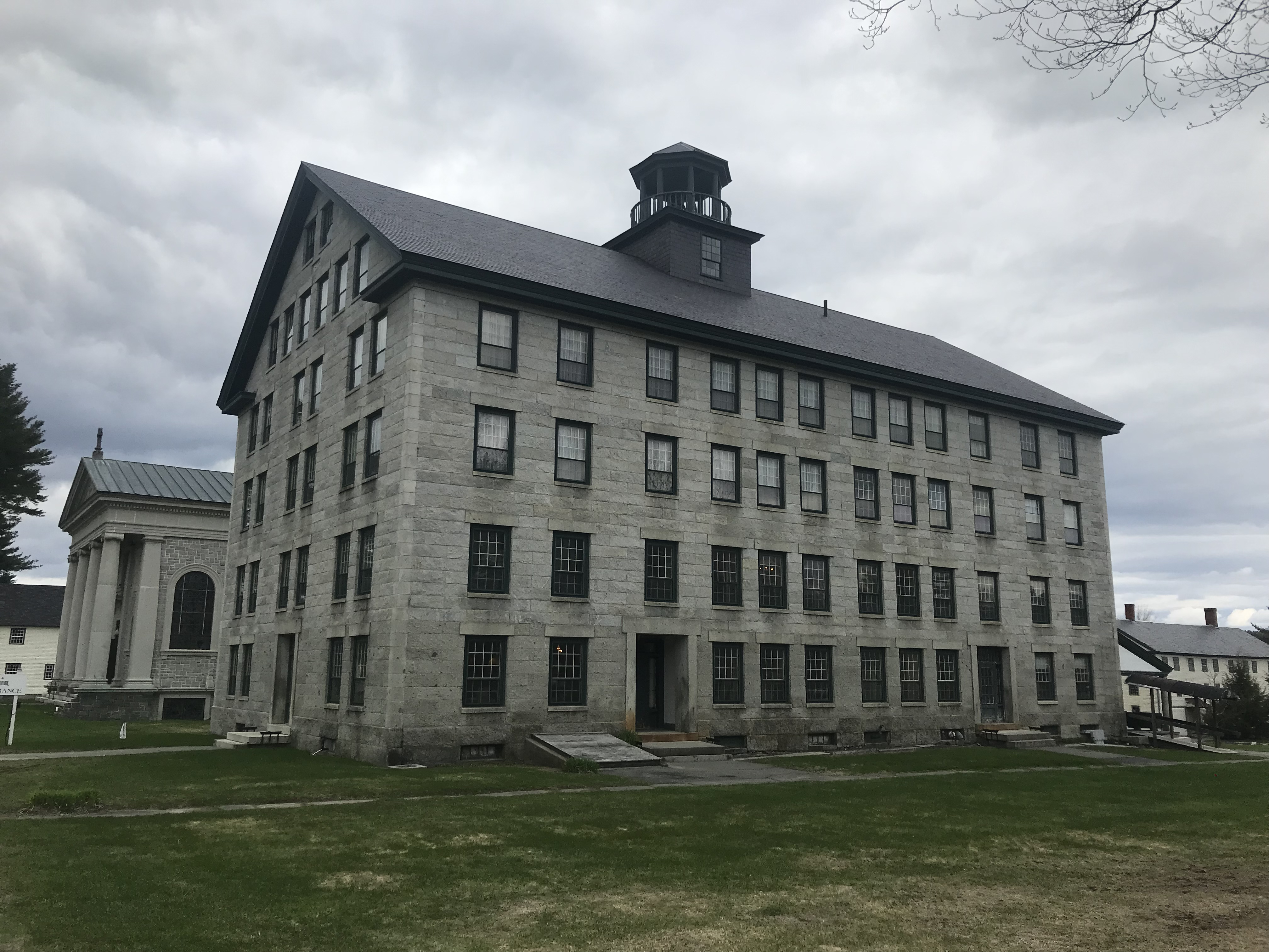 Enfield Shaker Museum, Außenansicht